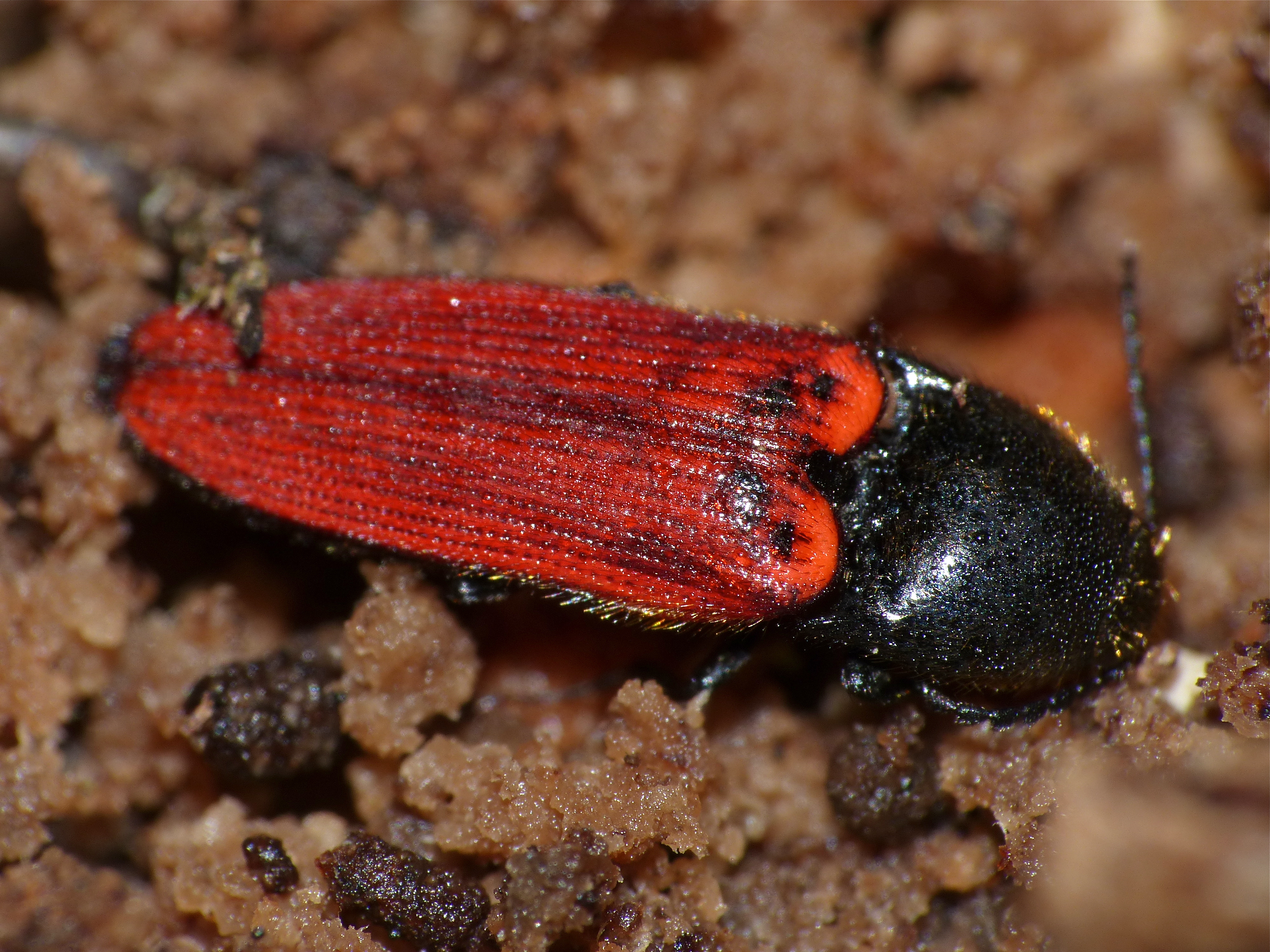 Forêt d' Ecouves, Orne, FRANCE